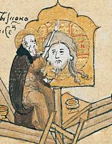 Роспись иконописцем Андреем Рублевым Спасского собора Андроникова монастыря Ок. 1592 г. 31.5 × 20 см Российская государственная библиотека, Москва, Россия Лицевое Житие преподобного Сергия [ф. 304, III, № 21 / М.8663 (Троицк. III-21)], л. 230 (л. 227 по изд. 1853 г.)